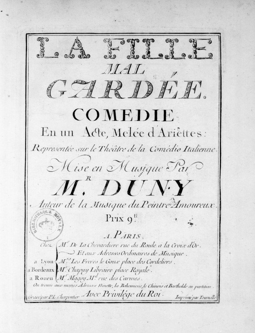 Page de titre de La Fille mal gardée, comédie en un acte. Musique d'Egidio Duni, parole de Charles-Simon Favart (éd. Louis-Balthazar de La Chevardière, 1758 — BnF).